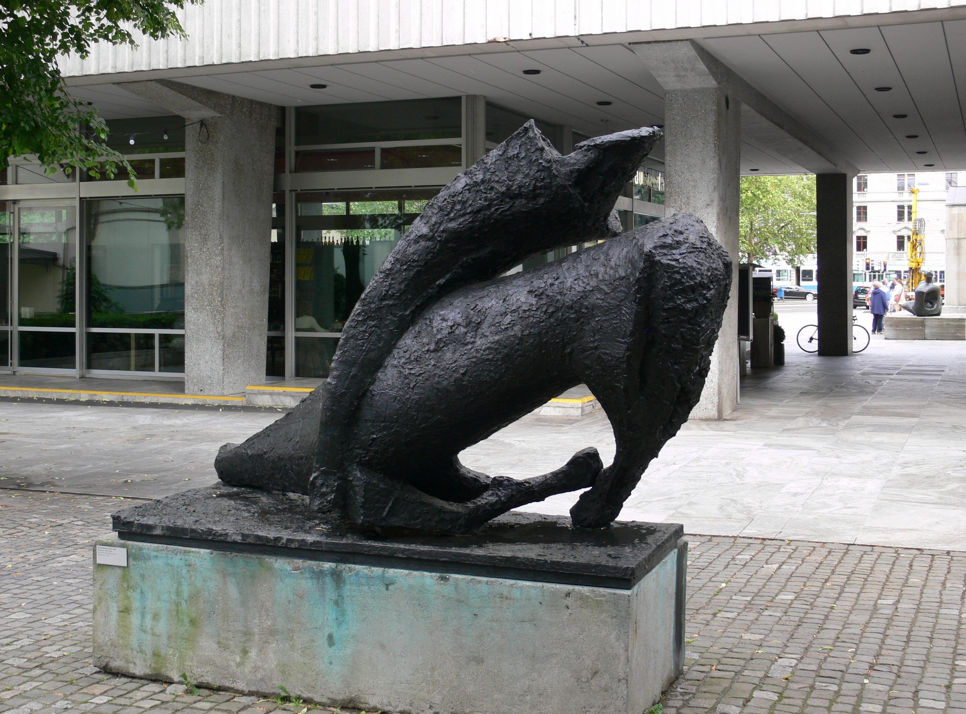 Marino Marini (1901–1980): Miracolo, 1959–1960, Geschenk Schweizerischer Bankverein 1962 aufgestellt vor dem Kunsthaus Zürich